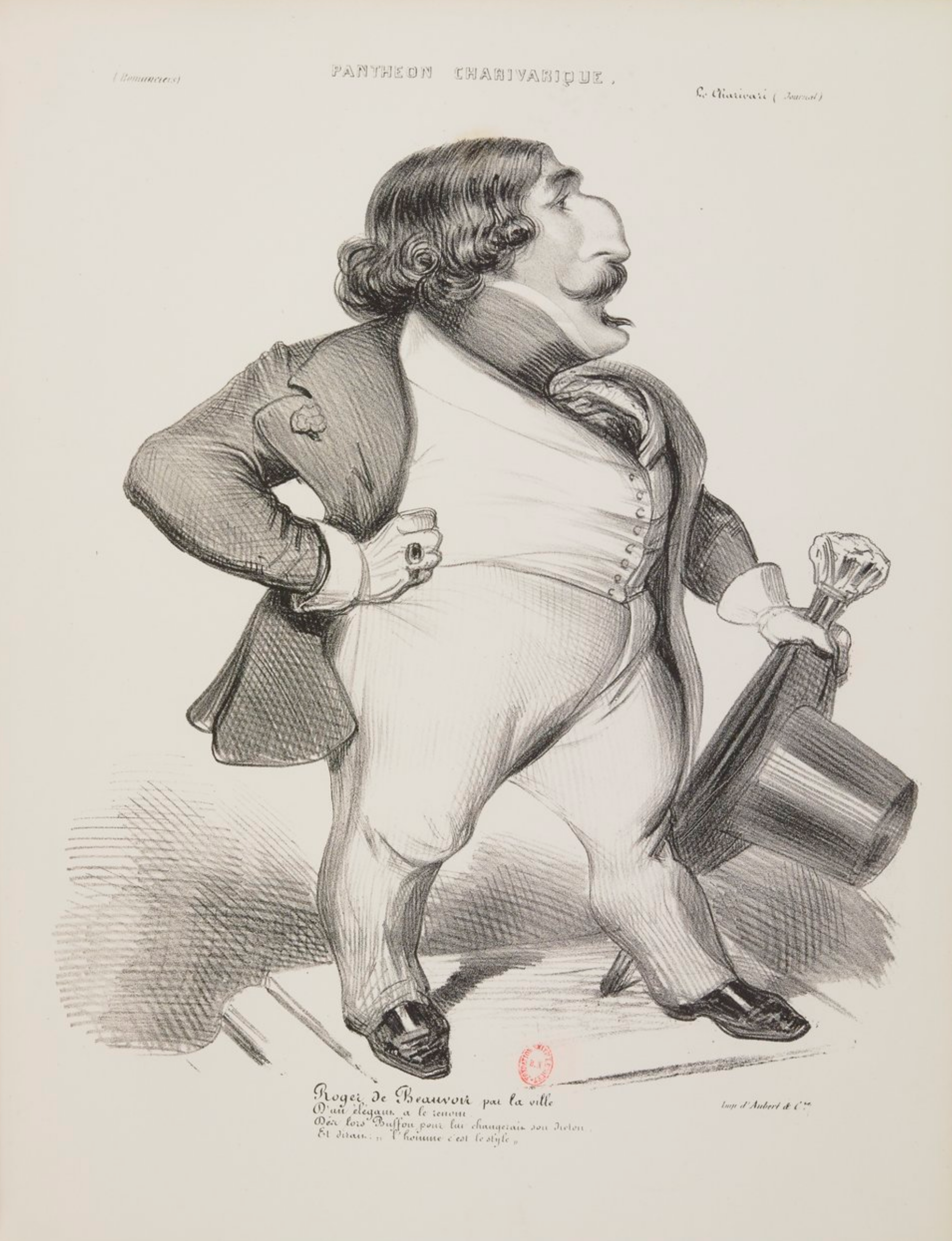 Benjamin Roubaud, Lithographe (1811-1847).- Caricature de Roger de Beauvoir, (1807-1866) in Panthéon charivarique, Portraits humoristiques (1800-1869), Image 31. - IFN-10507320.